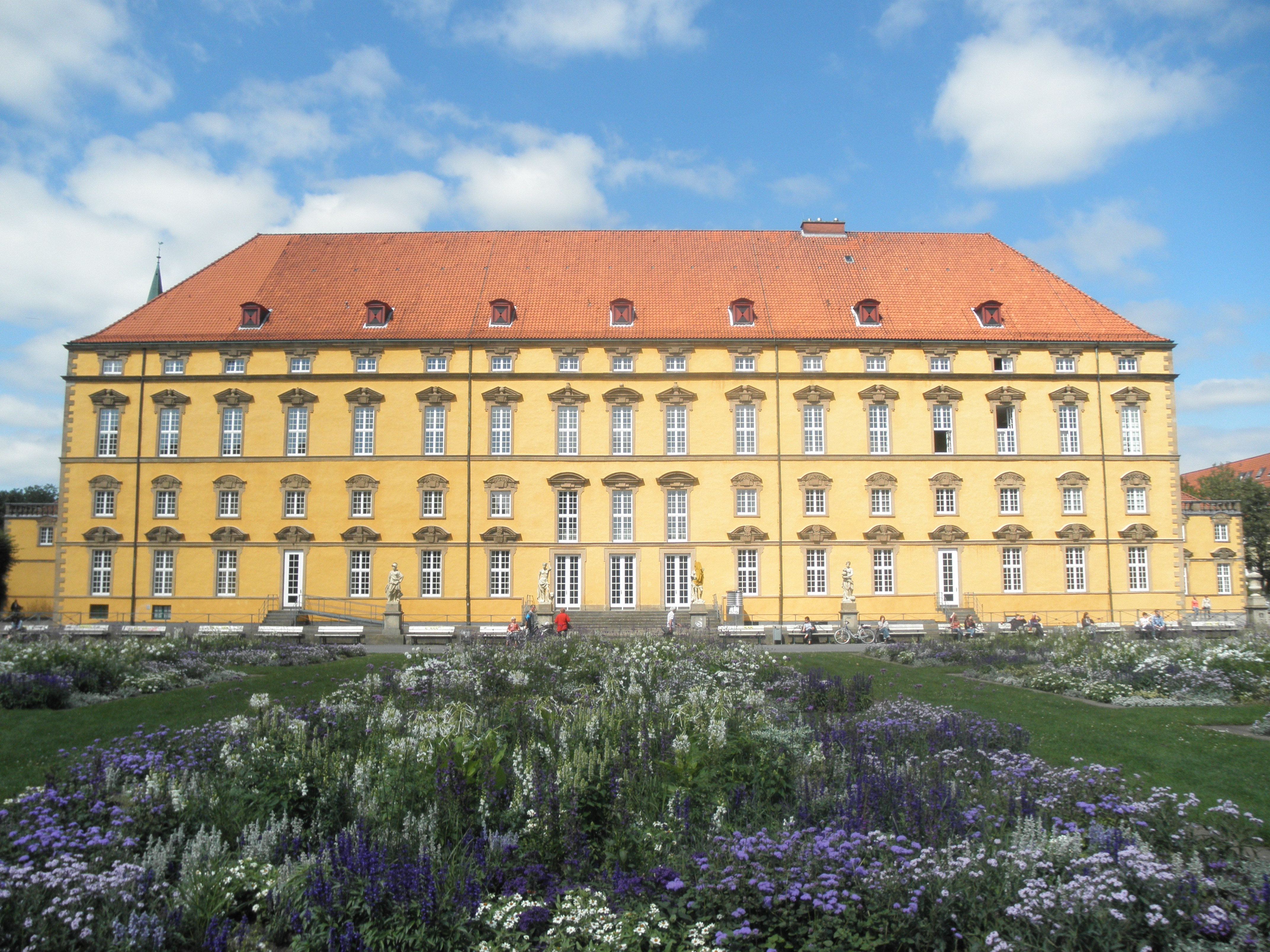 Kastelo Osnabrück